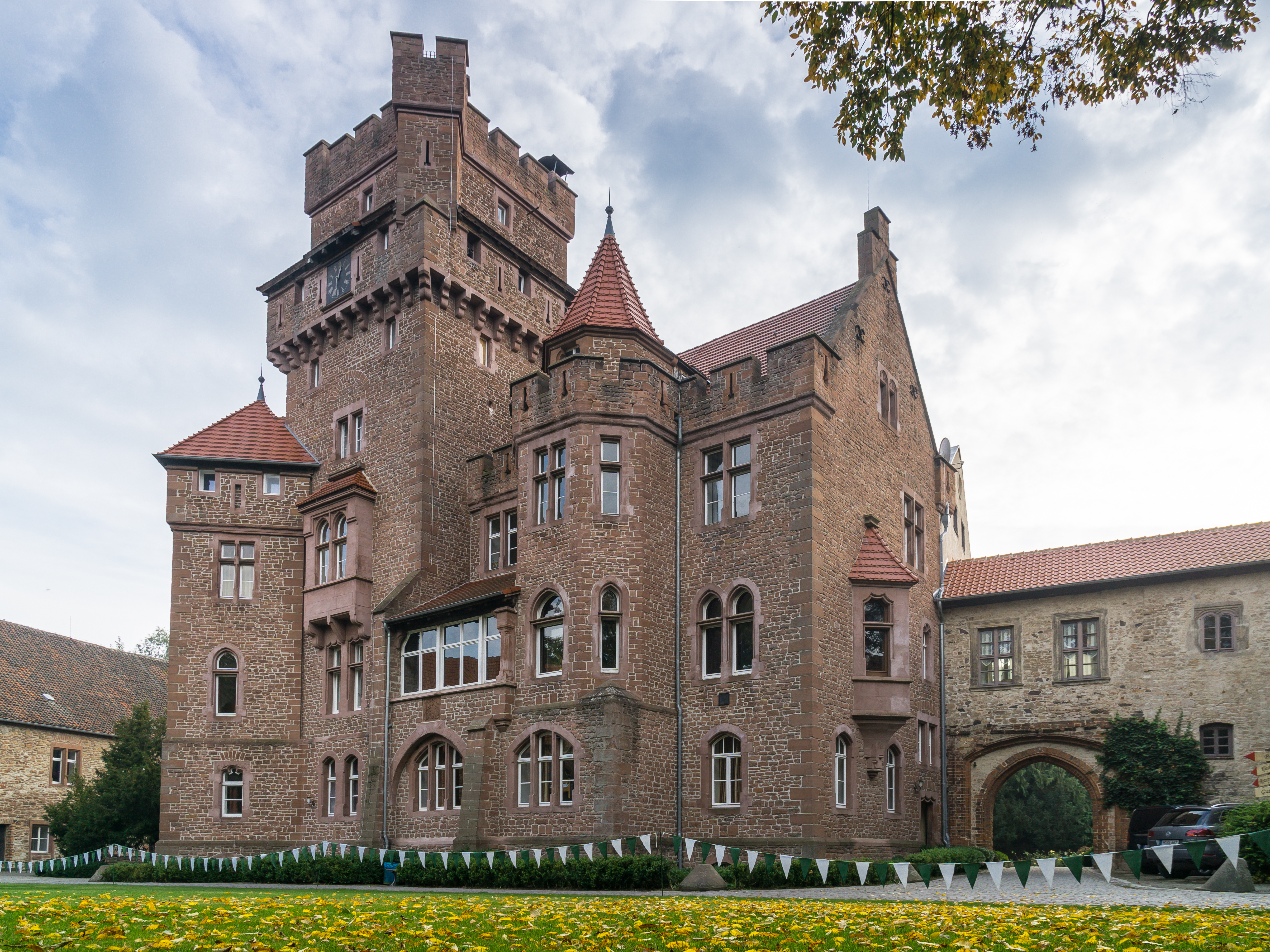 Schloss Altenhausen, Schloßstraße 11-17 in Altenhausen